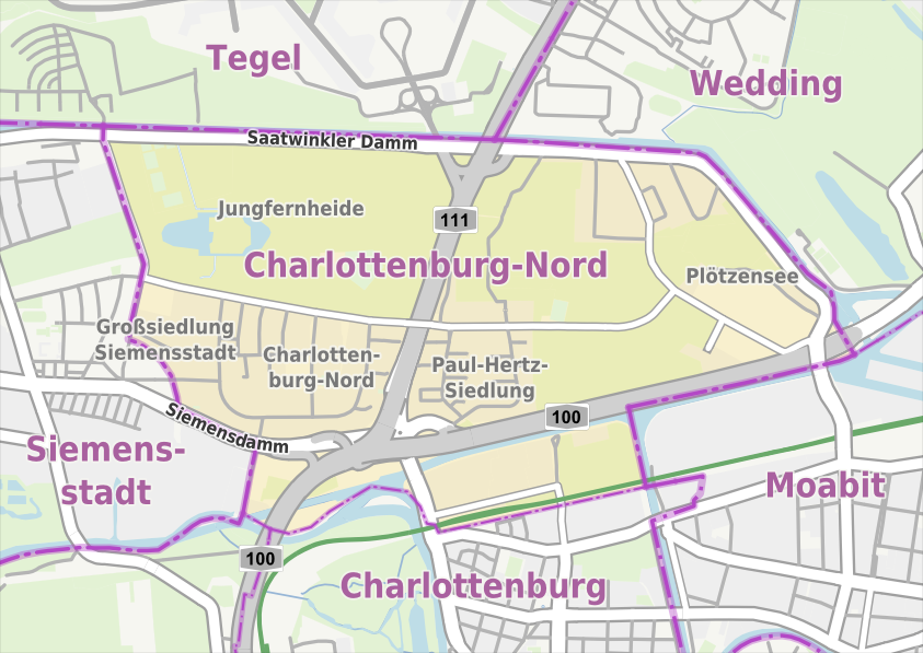 Übersichtskarte der Straßen und Ortslagen in Berlin-Charlottenburg-Nord